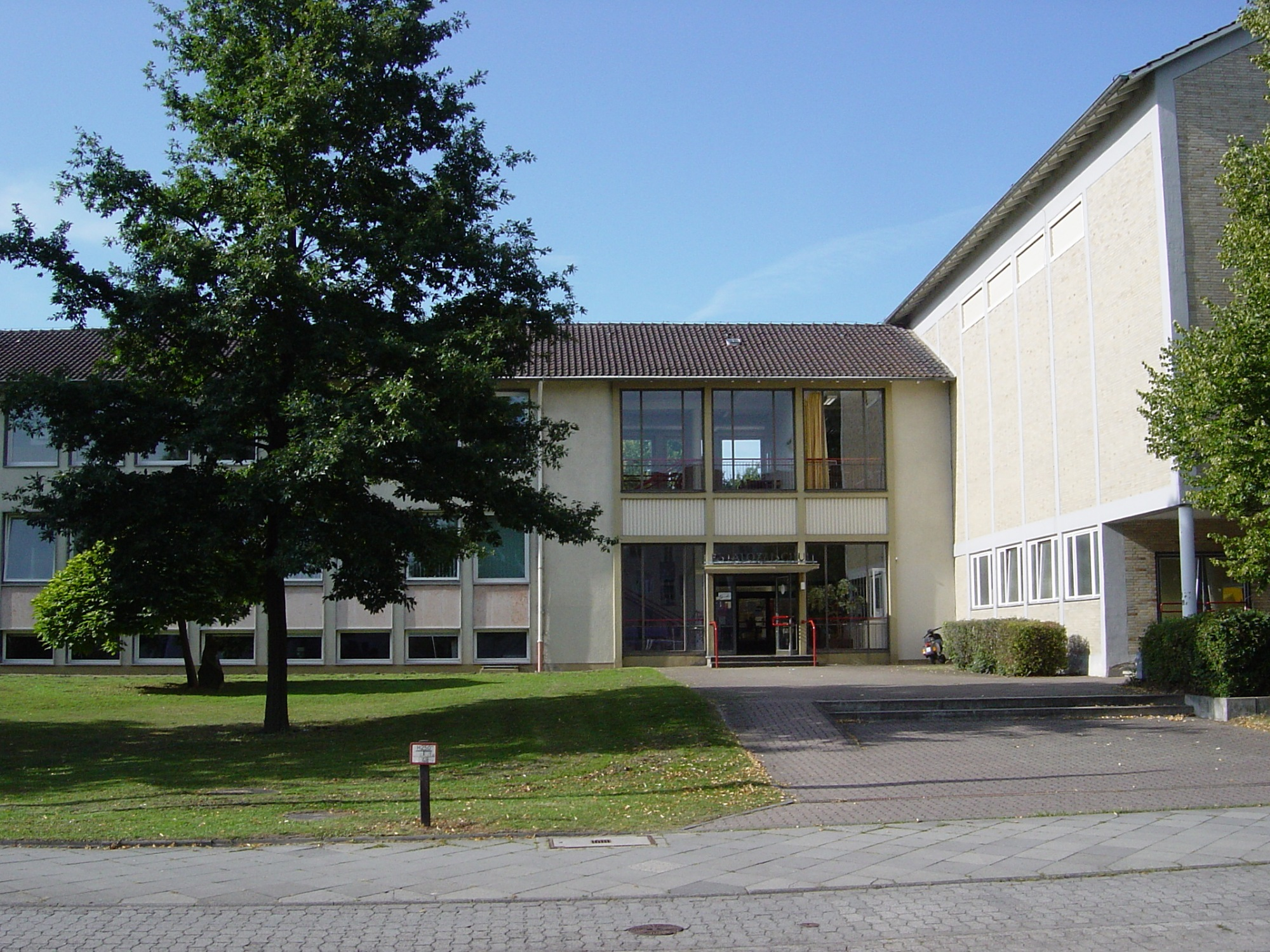 Pestalozzischule (Förderschule Schwerpunkt Lernen), Wolfsburg